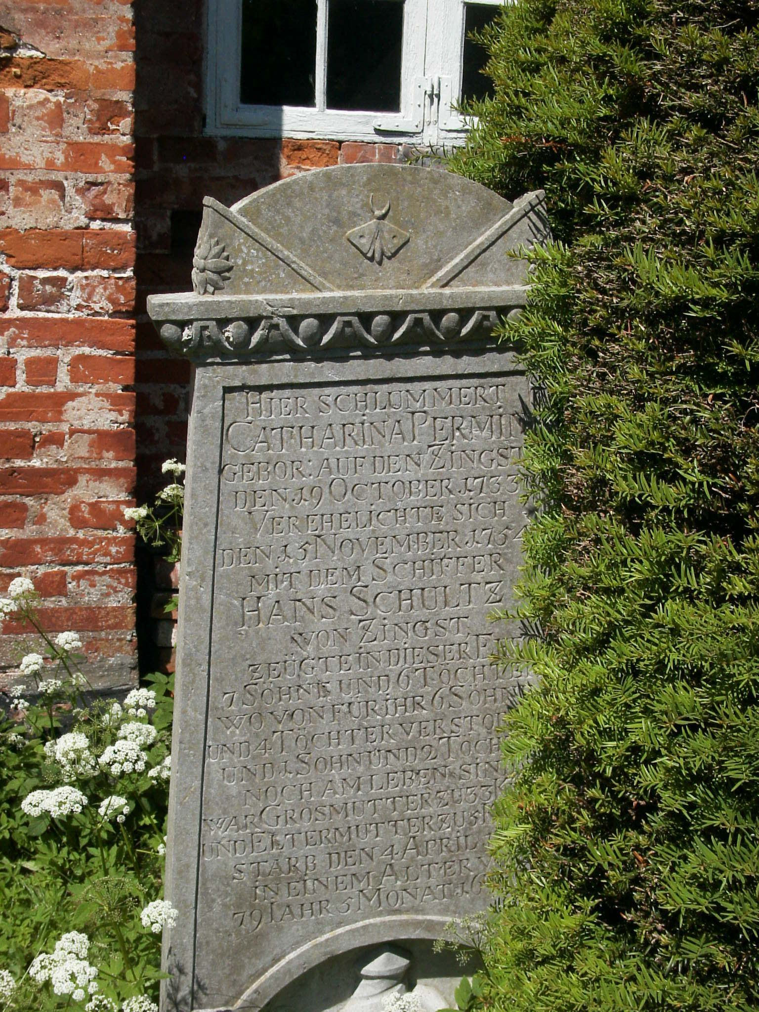 Alter Grabstein an der Außenwand der Seemannskirche in Prerow